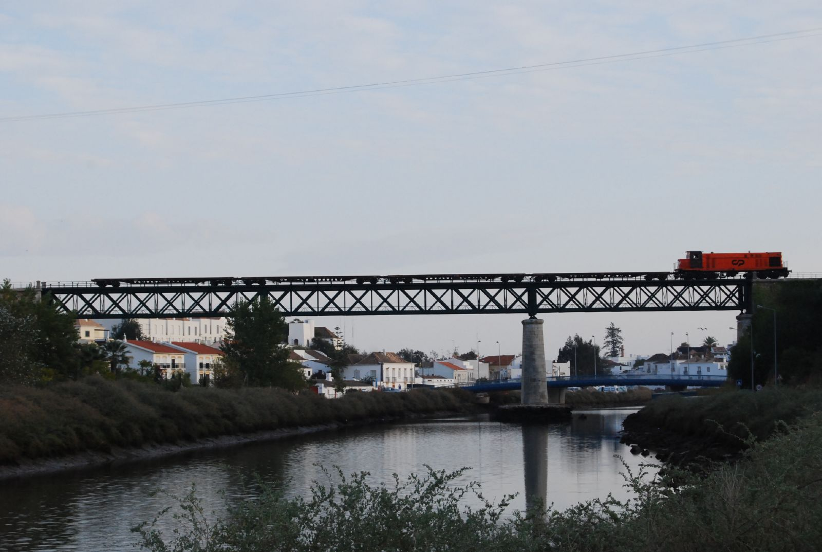 Portuguese train passing the Gilão/séqua River, near Tavira, in Portugal.